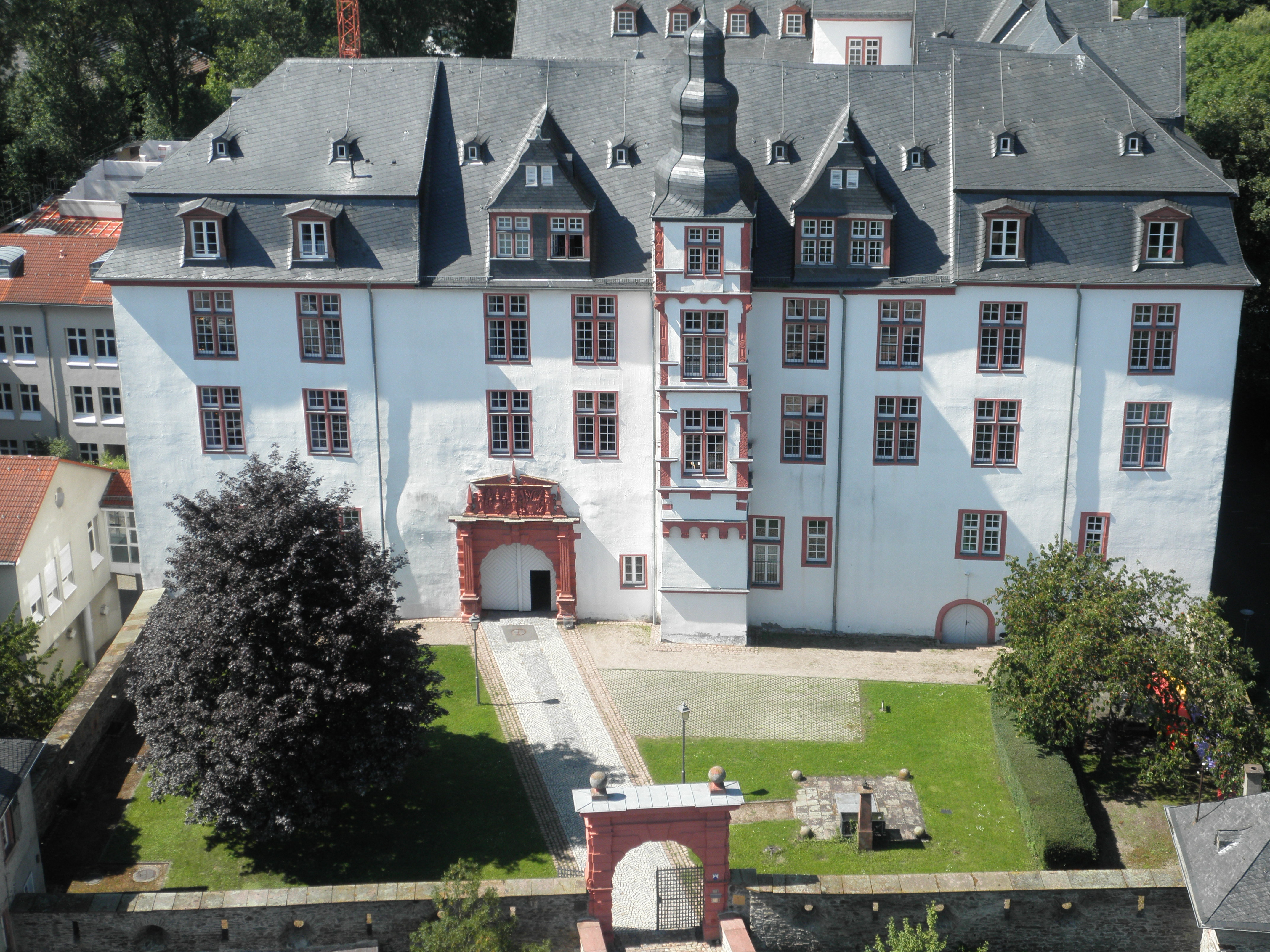 Residenzschloss Idstein